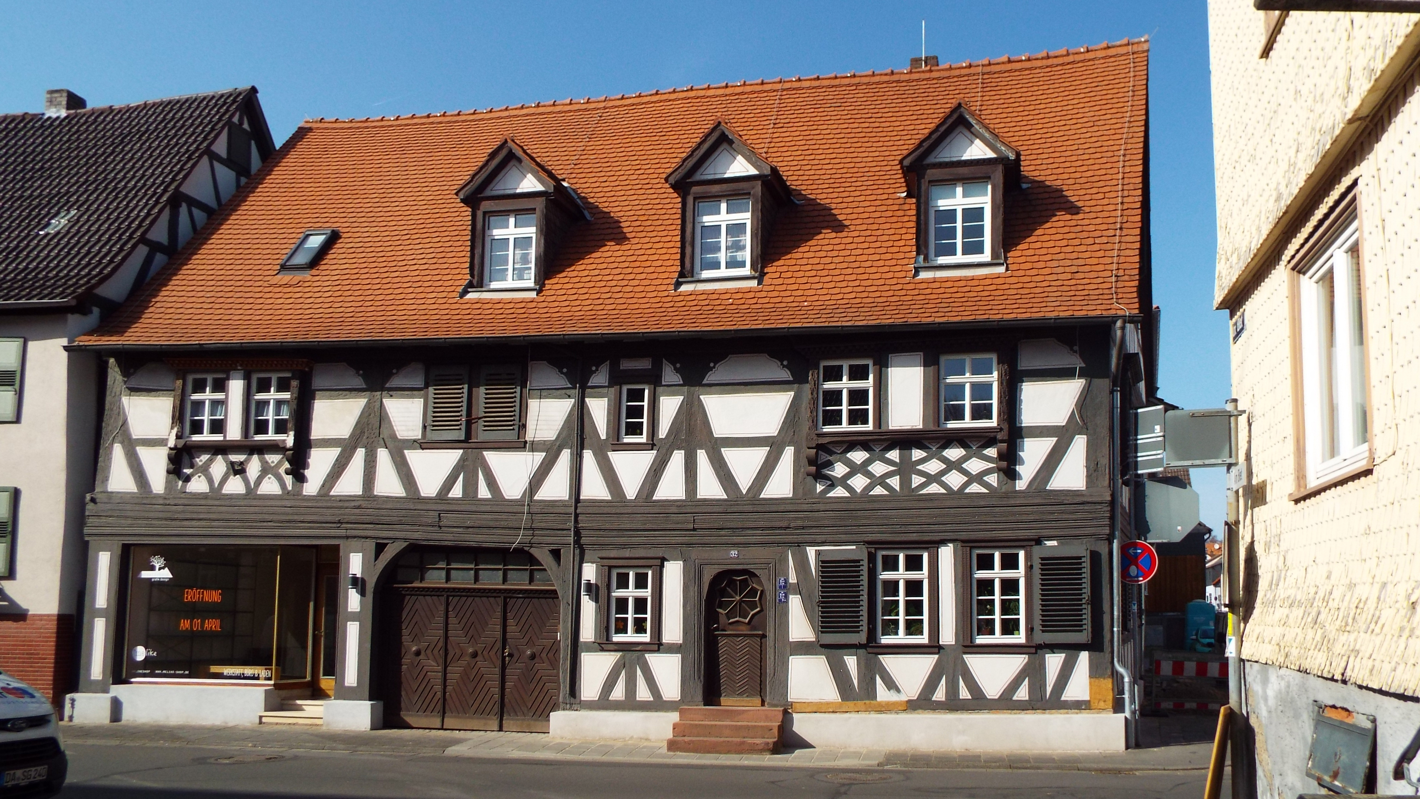 Wohnhaus- Fachwerkhaus - Kulturdenkmal in Reinheim